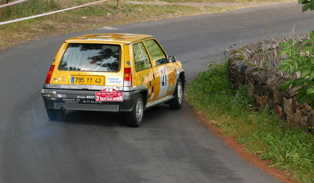 Renault Super5 GT Turbo en Rallye